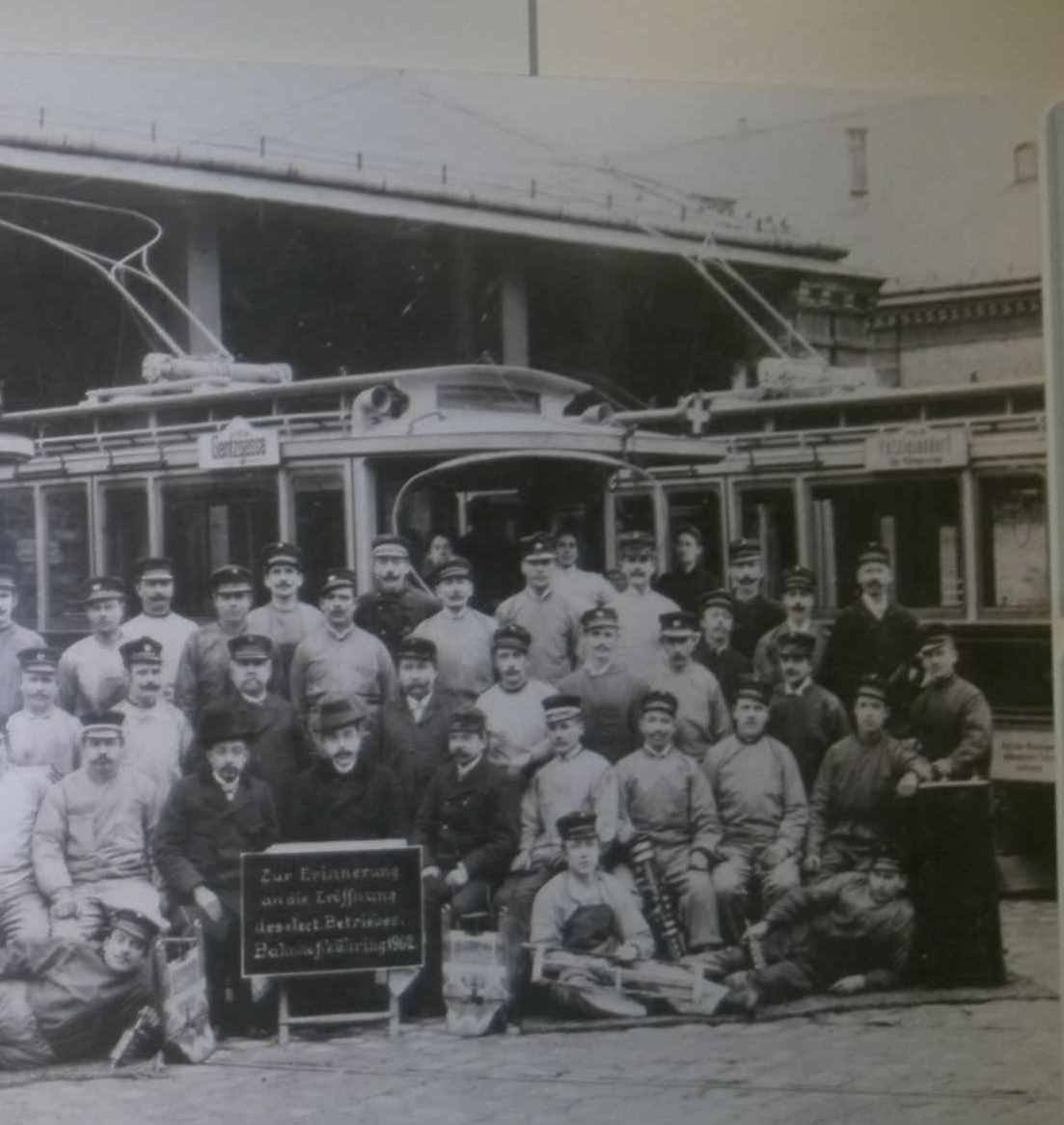 Die Remise der Gemeinde Wien, Städtische Straßenbahnen, im 18. Bezirk, Kreuzgasse (offiziell: Betriebsbahnhof Währing) wurde 1902 von Pferdetramwaybetrieb auf elektrischen Straßenbahnbetrieb umgestellt. Aus diesem Anlass wurde ein Erinnerungsfoto der Mitarbeiter der Remise angefertigt. Es wird hier ein Ausschnitt wiedergegeben.